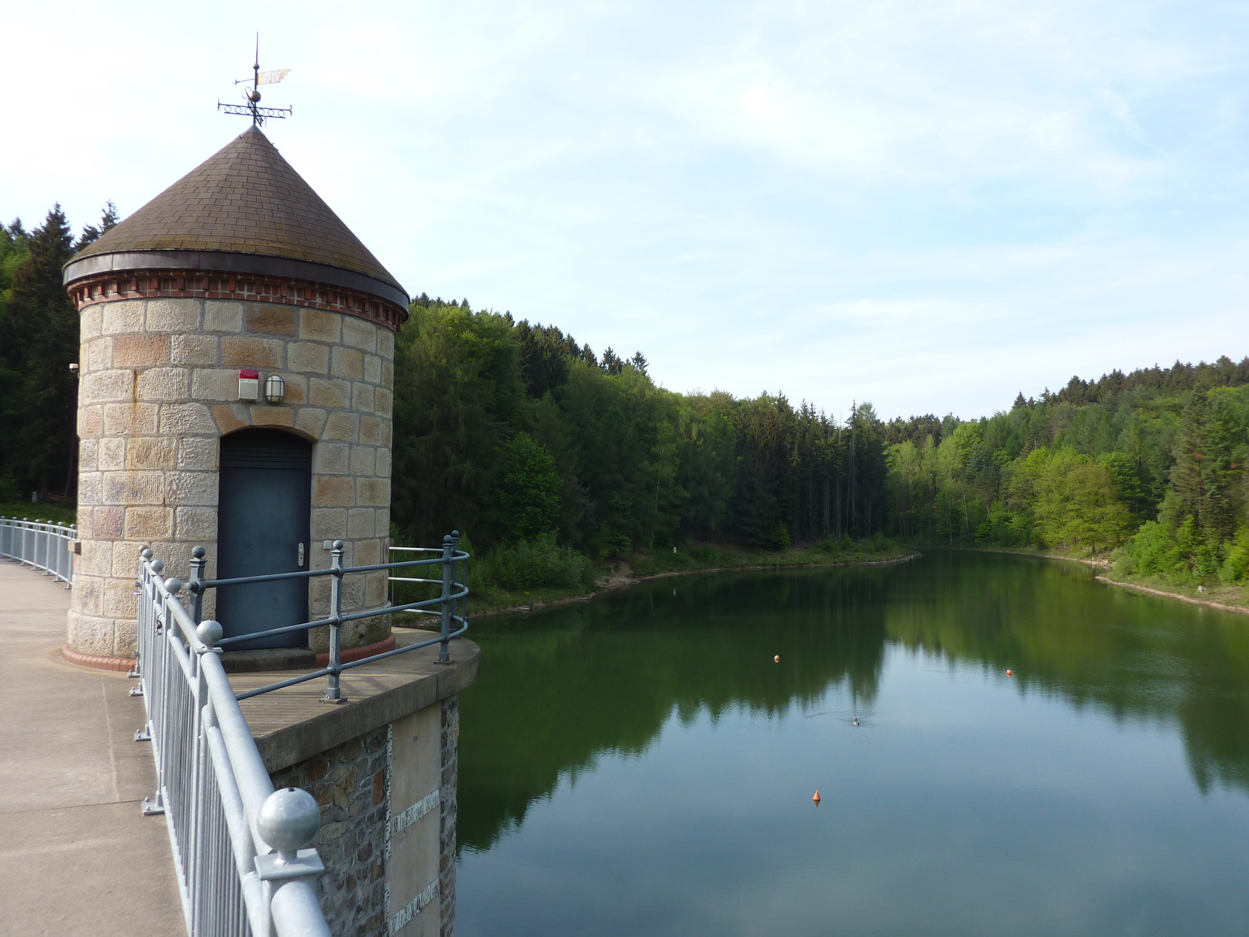 Ronsdorfer Talsperre, WuppertalThis is a photograph of an architectural monument. 3500